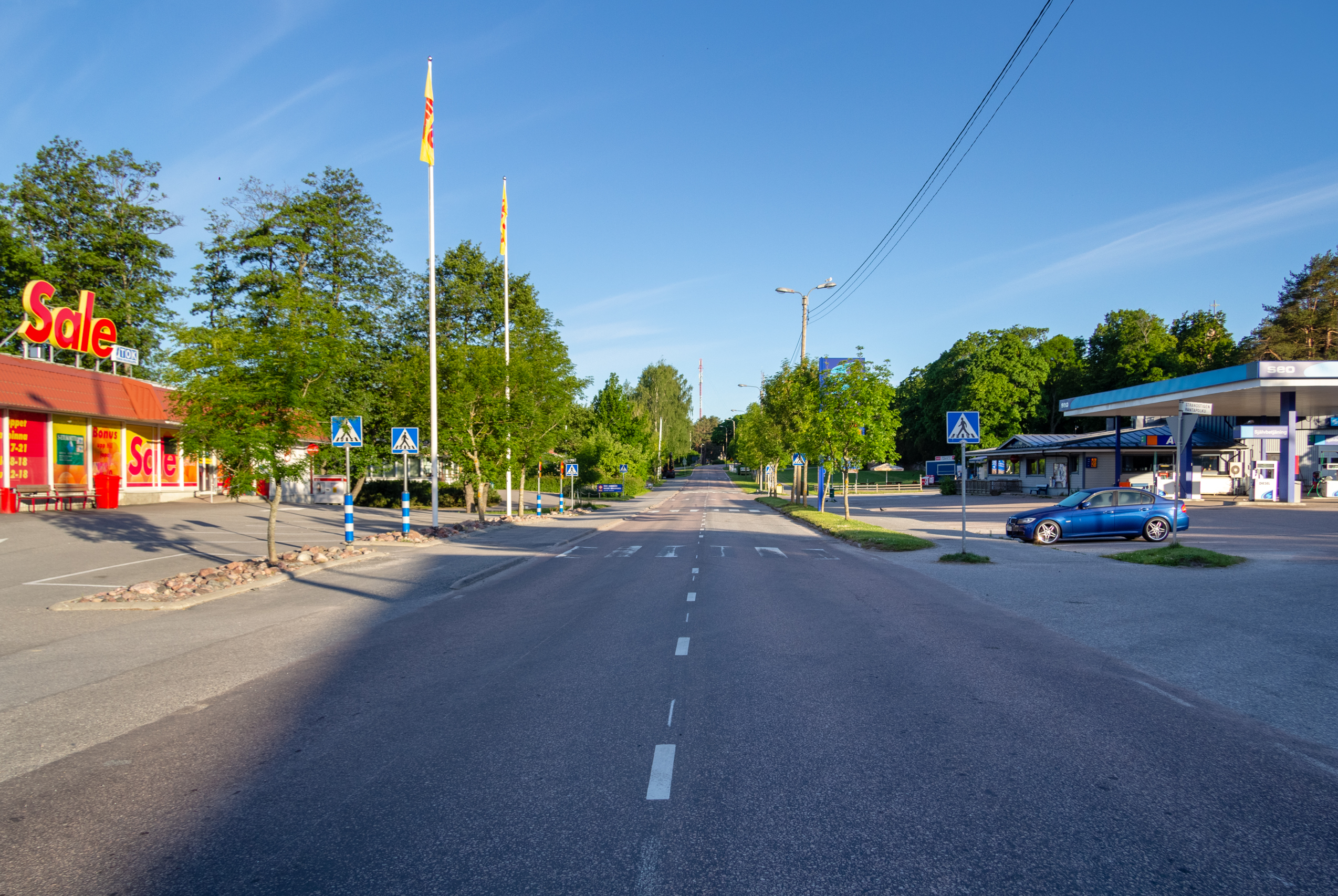 Bild på Nagu Skärgårdsväg, mitt i Nagu centrum, med riktning mot Korpo.